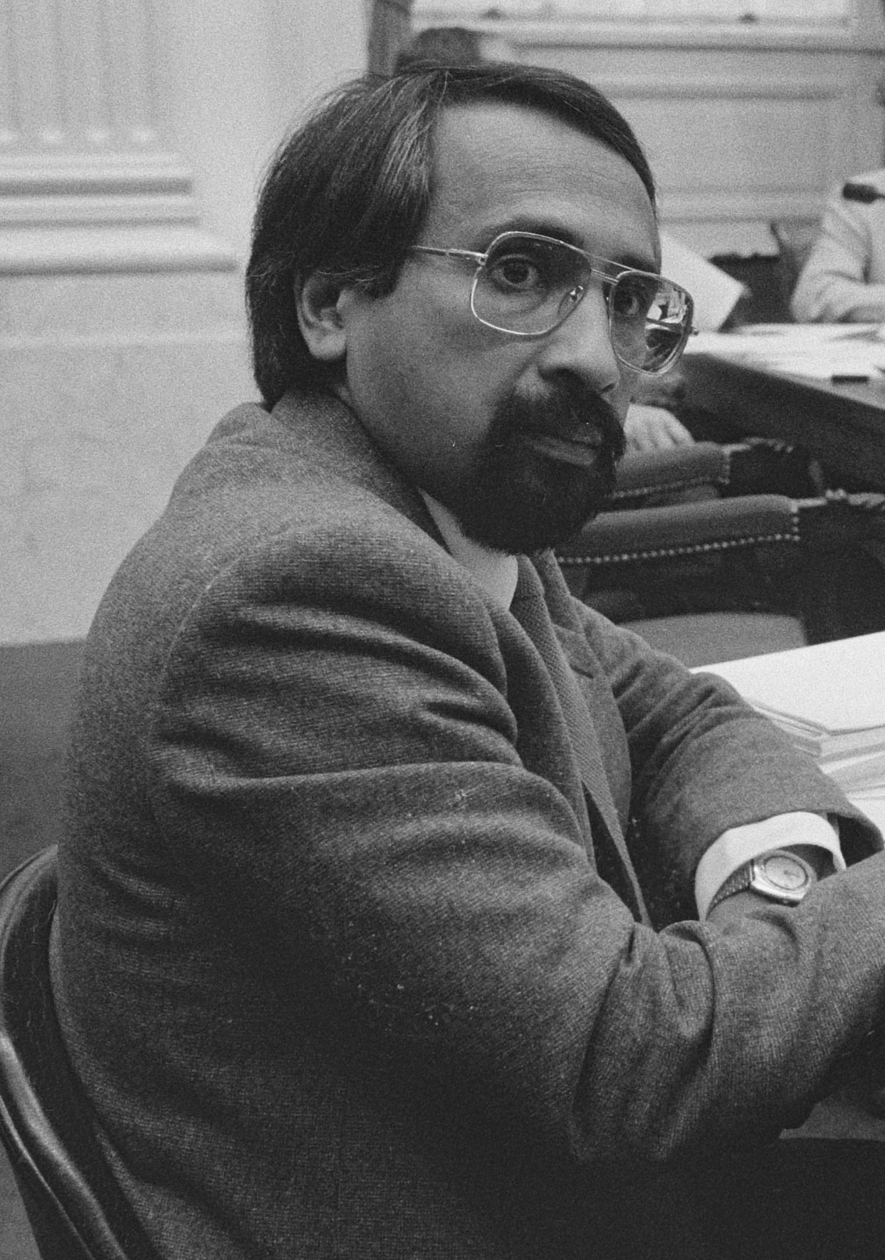 Collectie / Archief : Fotocollectie Anefo Reportage / Serie : [ onbekend ] Beschrijving : Tweede Kamer : VCV vaste commissie voor minderhedenbeleid PvdA woordvoerder John Lilypaly tijdens maiden-speech Datum : 27 oktober 1986 Trefwoorden : politiek Persoonsnaam : Pvda Woordvoerder John Lilypaly Instellingsnaam : Tweede Kamer Fotograaf : Bogaerts, Rob / Anefo Auteursrechthebbende : Nationaal Archief Materiaalsoort : Negatief (zwart/wit) Nummer archiefinventaris : bekijk toegang 2.24.01.05 Bestanddeelnummer : 933-7975